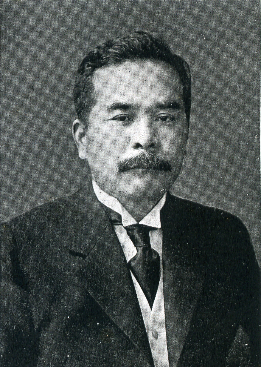 この写真は、松山常次郎（1884-1961）の写真です。